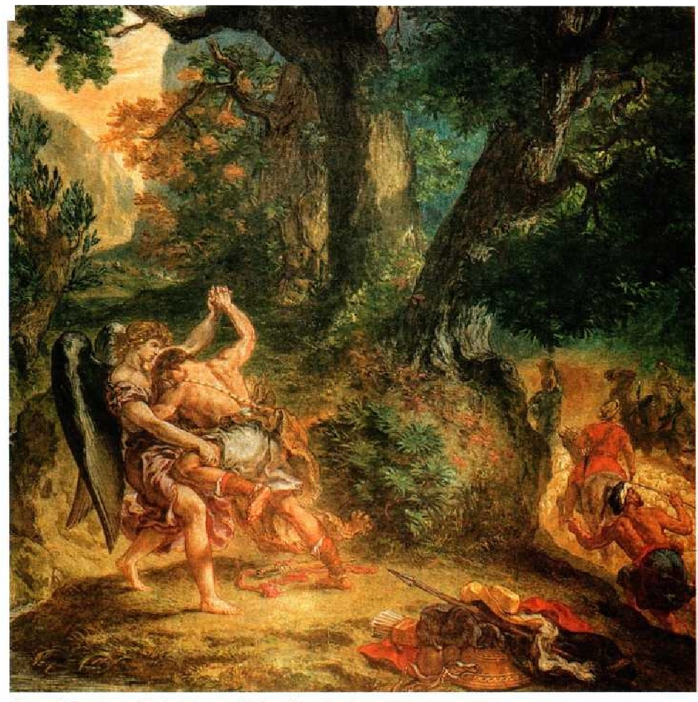 Jakob aingeruarekin borrokan» koadroa, 1861ean margotua.